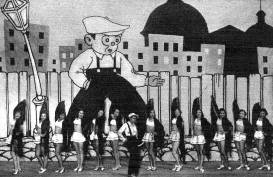 La vedette Laura Pinillos en una escena de la Revista Las Leandras